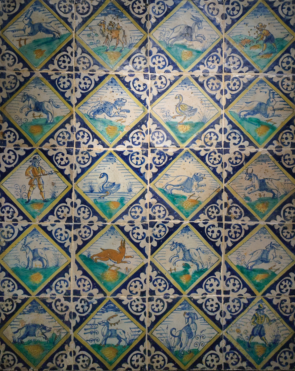 Tegelveld dieren Veelkleurige kwadraattegels waren tussen 1580 en 1625 erg populair. Meestal met bloemen en dieren, soms portretten, schepen en kastelen. Het witte ornament is gemaakt door uitsparen van de figuren in een blauwe schildering. Datering 1600-1625